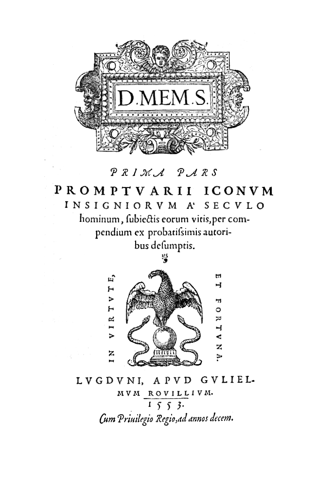 first page of Promptuarii Iconum Insigniorum